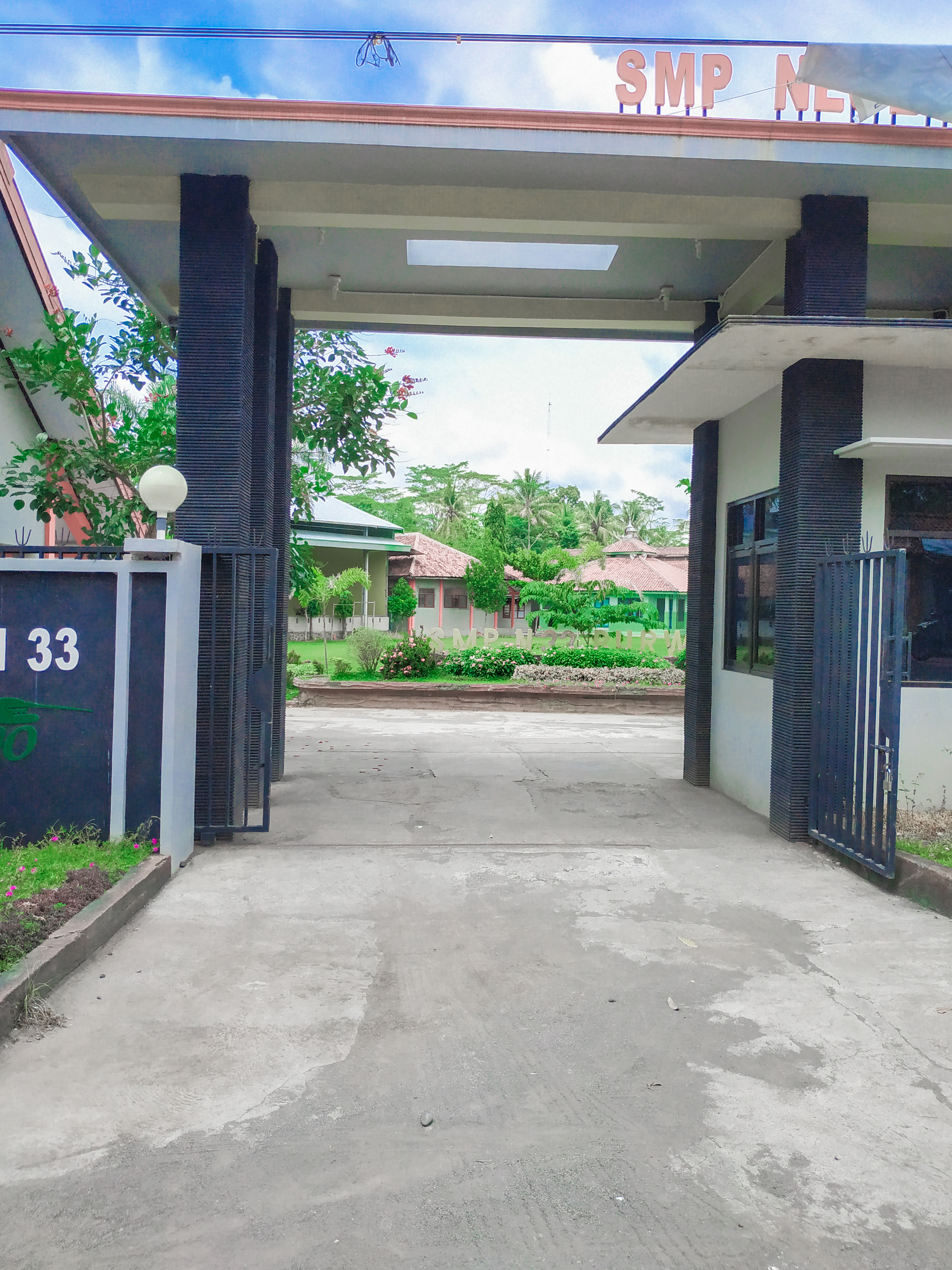 gerbang masuk utama SMP Negeri 33 Purworejo yang baru